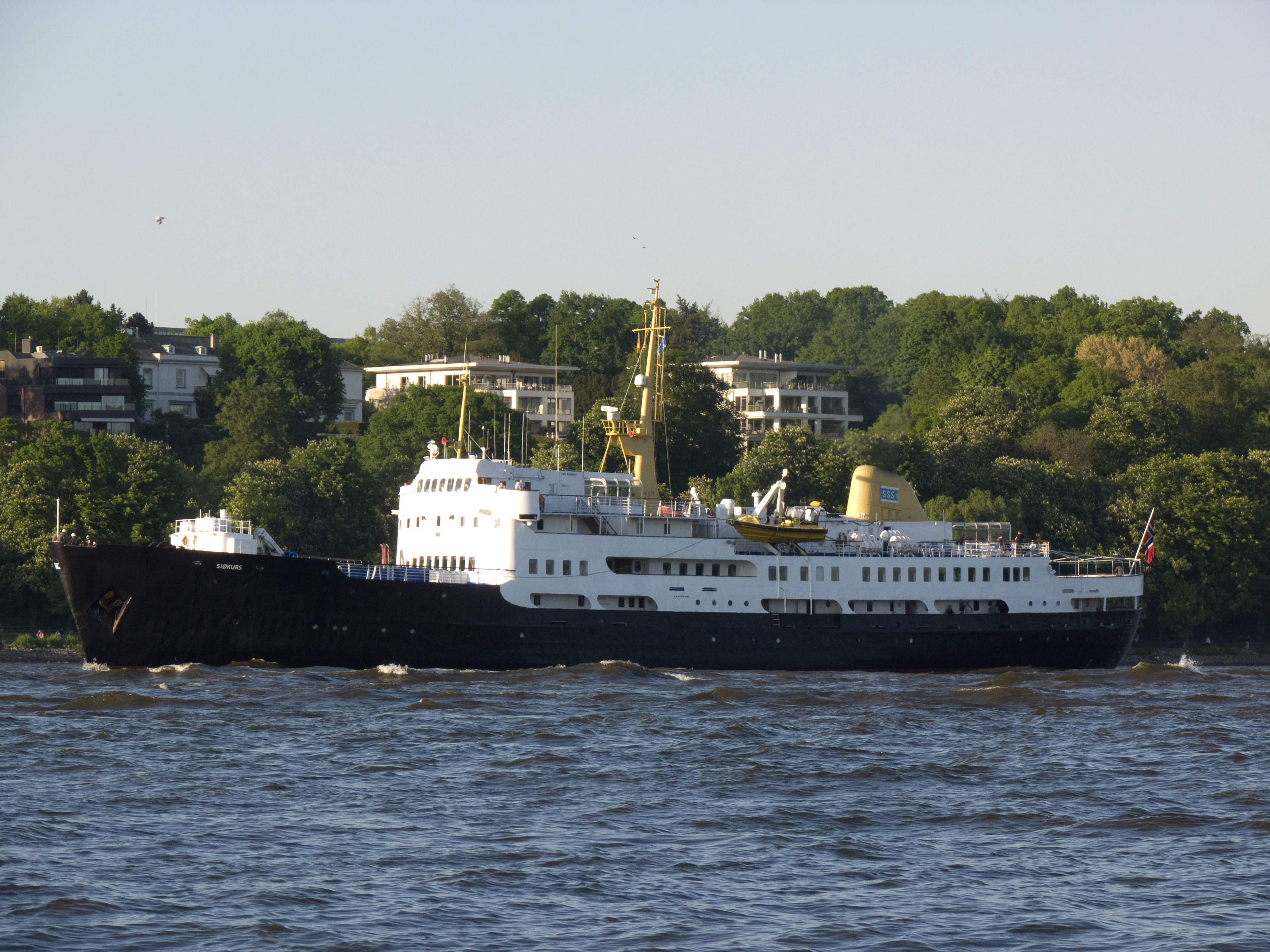 8 Mai 2011 Auslaufparade Hamburg Outbound